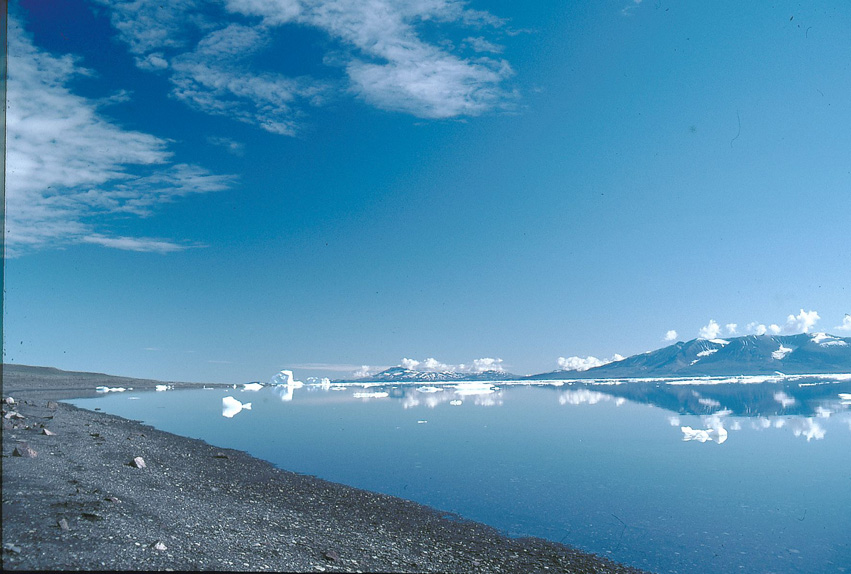 Den nordlige bred af Kejser Franz Josef Fjord nær Stensjö Bjerg The north of Kejser Franz Josef Fjord near Stensjö Bjerg